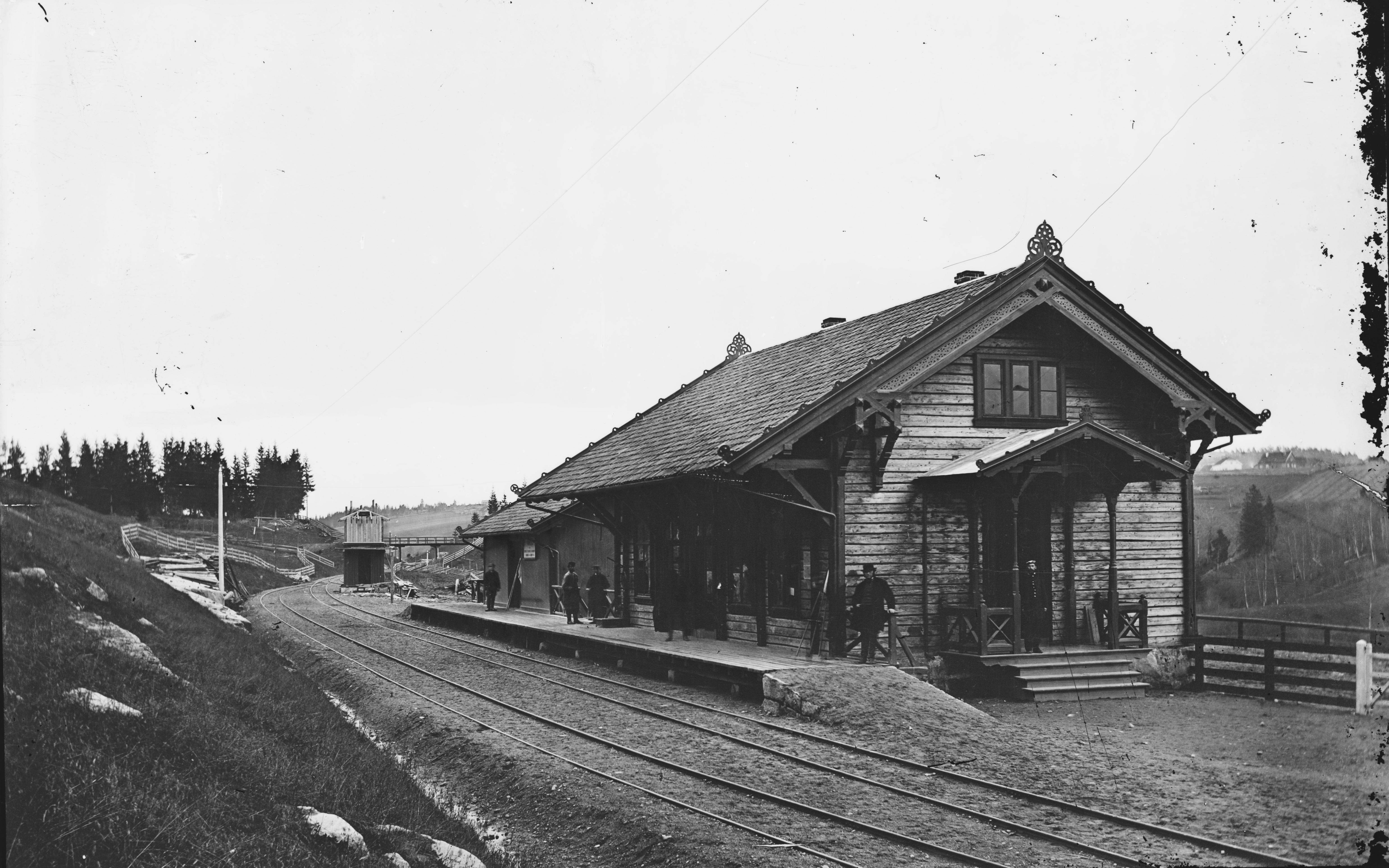 Sted: Røyken Kommune: Røyken Fylke: Buskerud Tagger